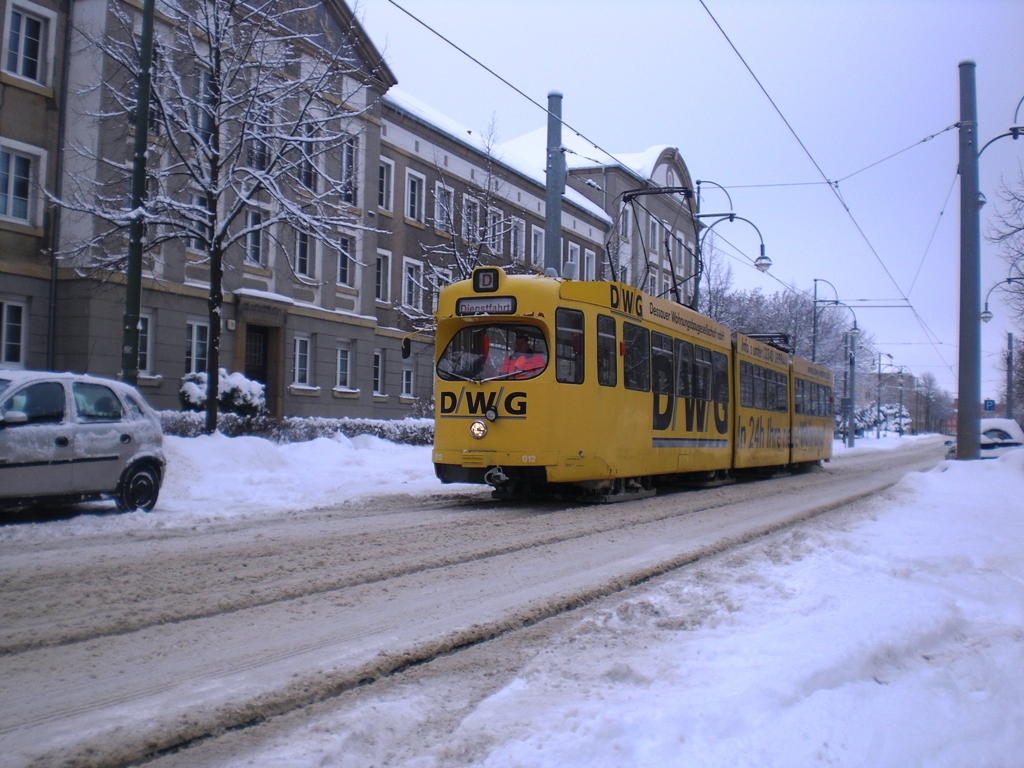 Arbeitswagen 012 der DVG Dessau am 28.12.2010 in der Fritz-Hesse-Straße.